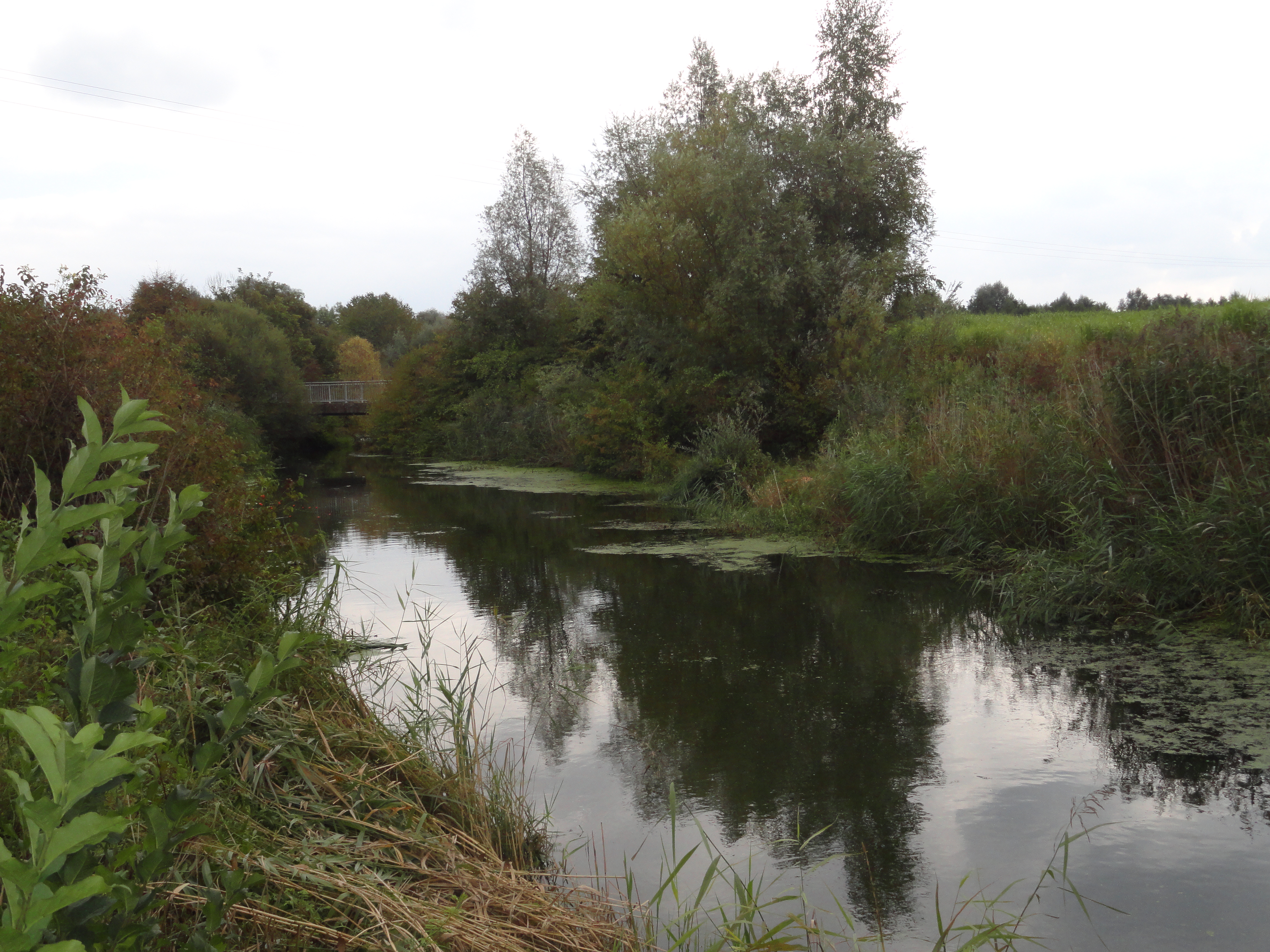 Kleine Laber bei Landstorf; Blickrichtung Ost